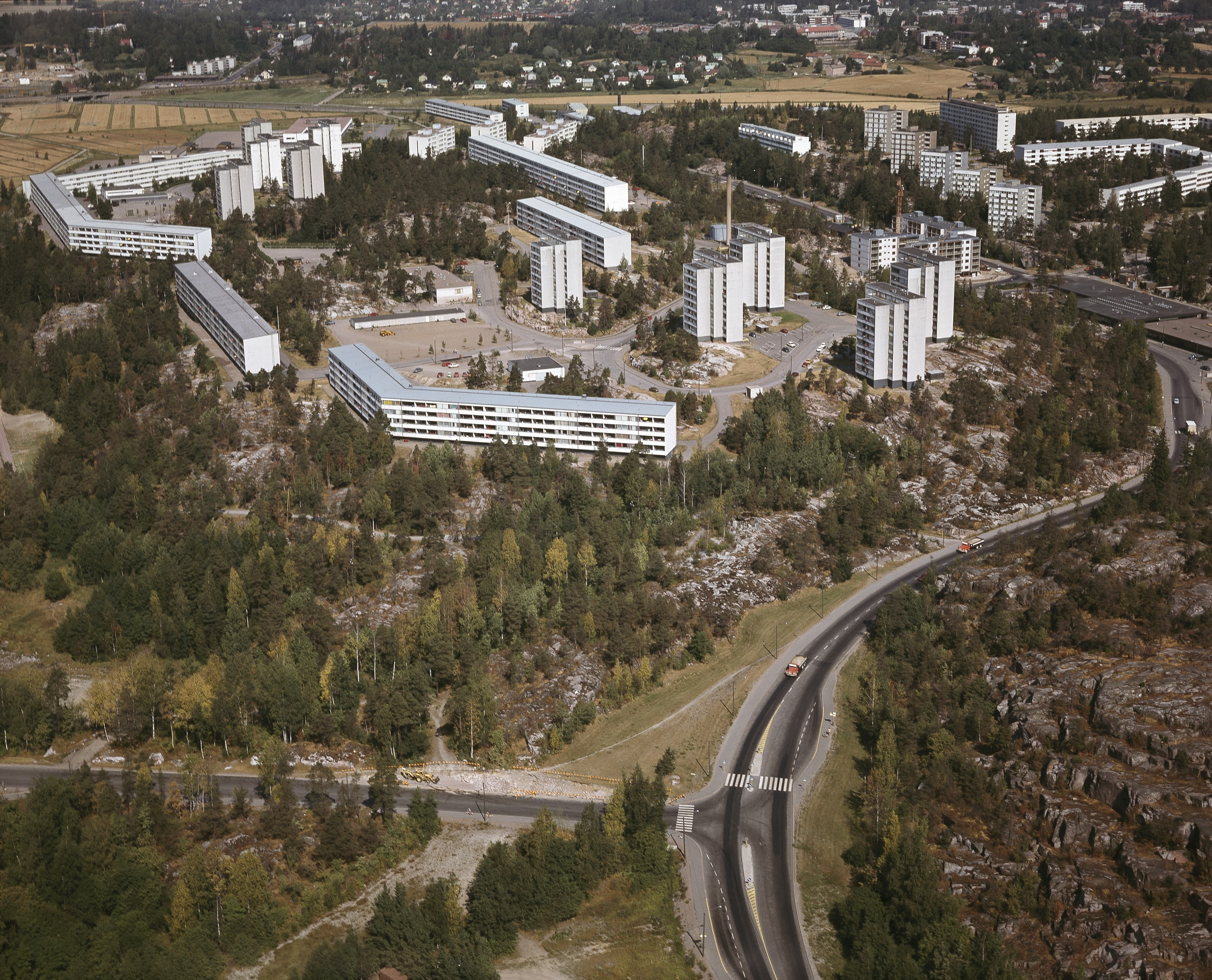 Helsingin Pihlajamäki vuonna 1978, ilmakuva.